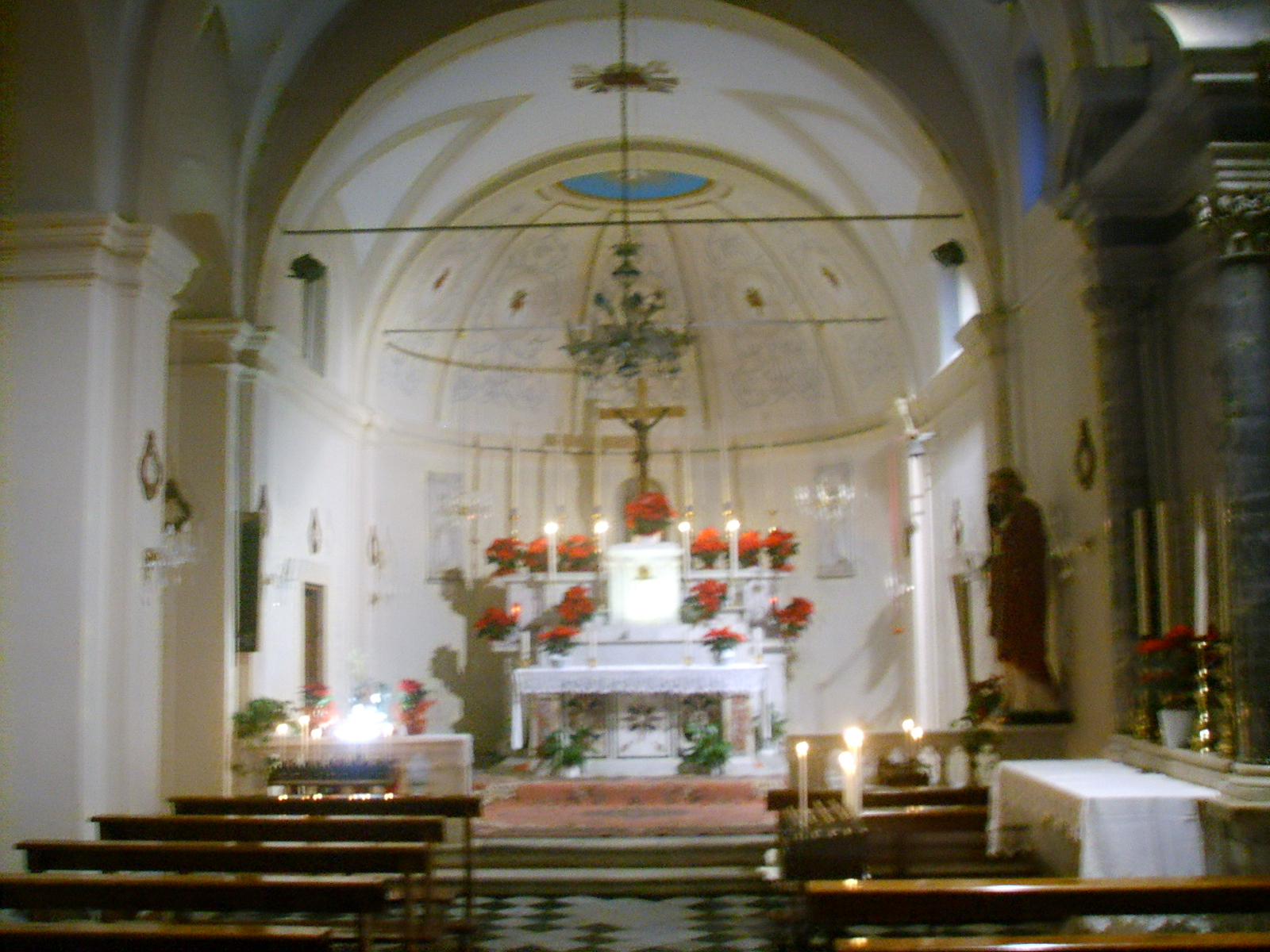 collegiata_di_san_bartolomeo belltower near carrara